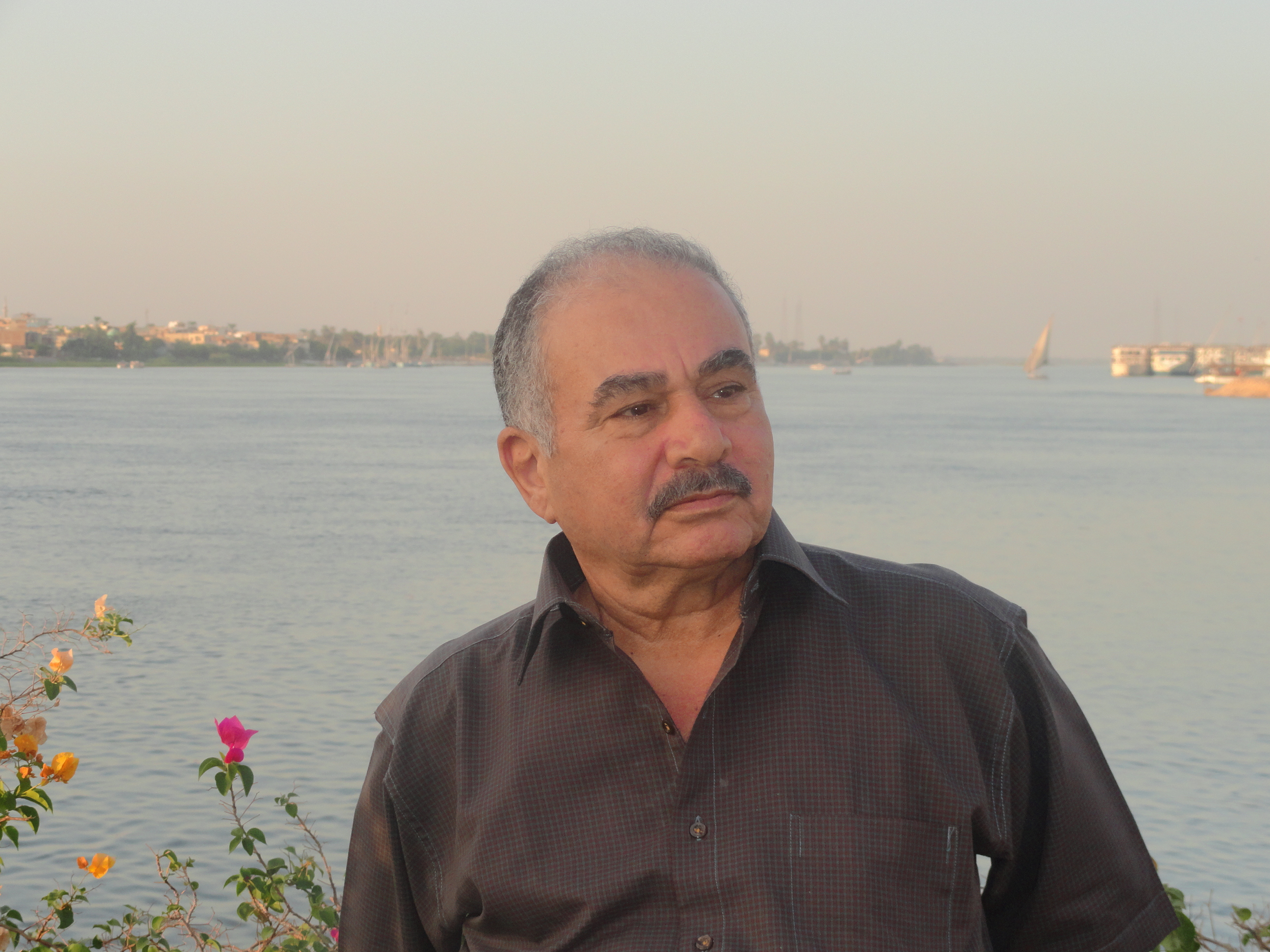 Египетский кинорежиссёр Мохамед Камель Эль-Кальюби